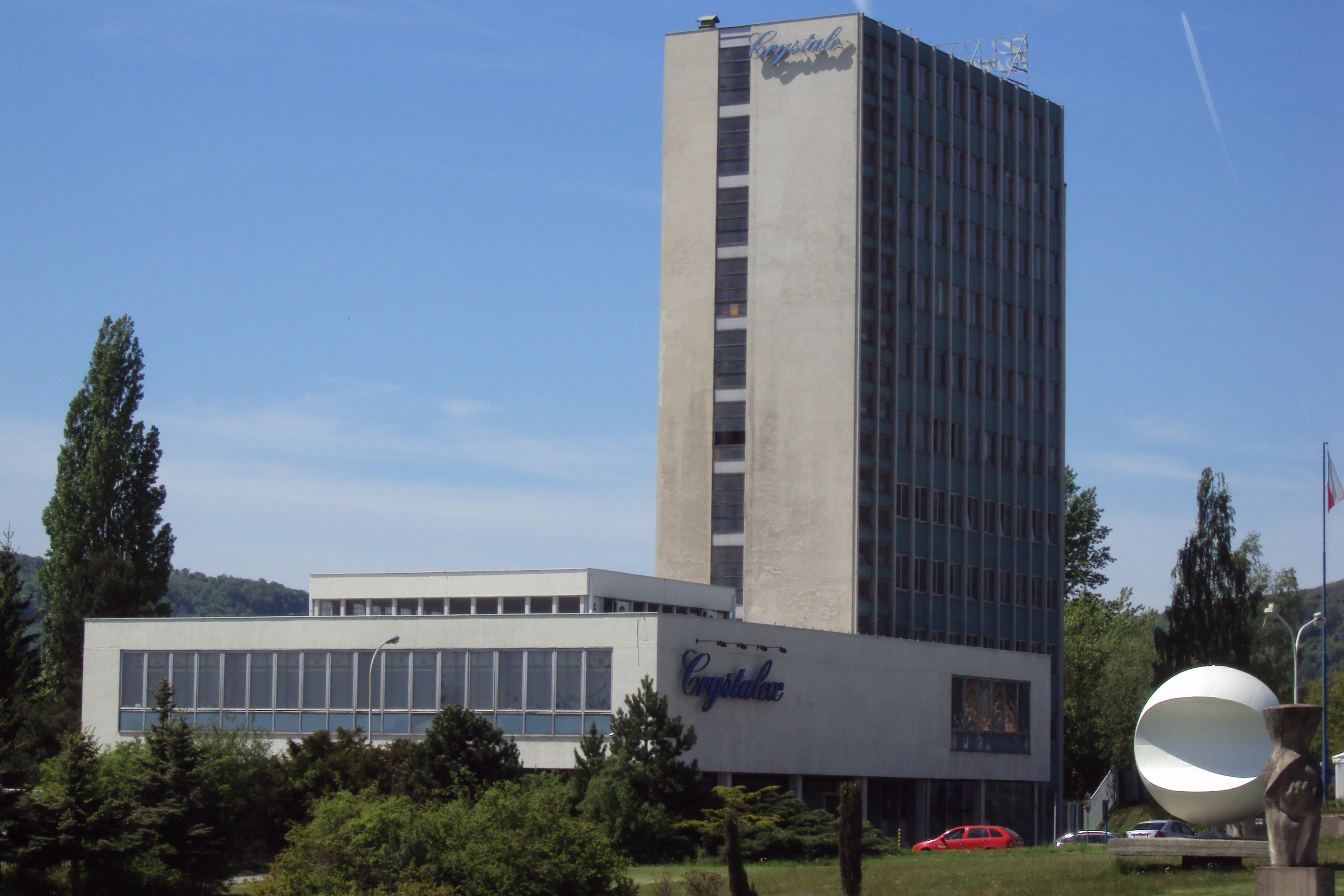 Sklárna Crystalex v Novém Boru